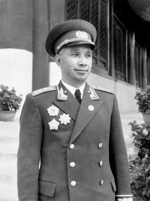 1955年，穿戎装的粟裕